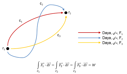 Gambar haluan daya dan kerja yang dilakukan oleh daya-daya tersebut.